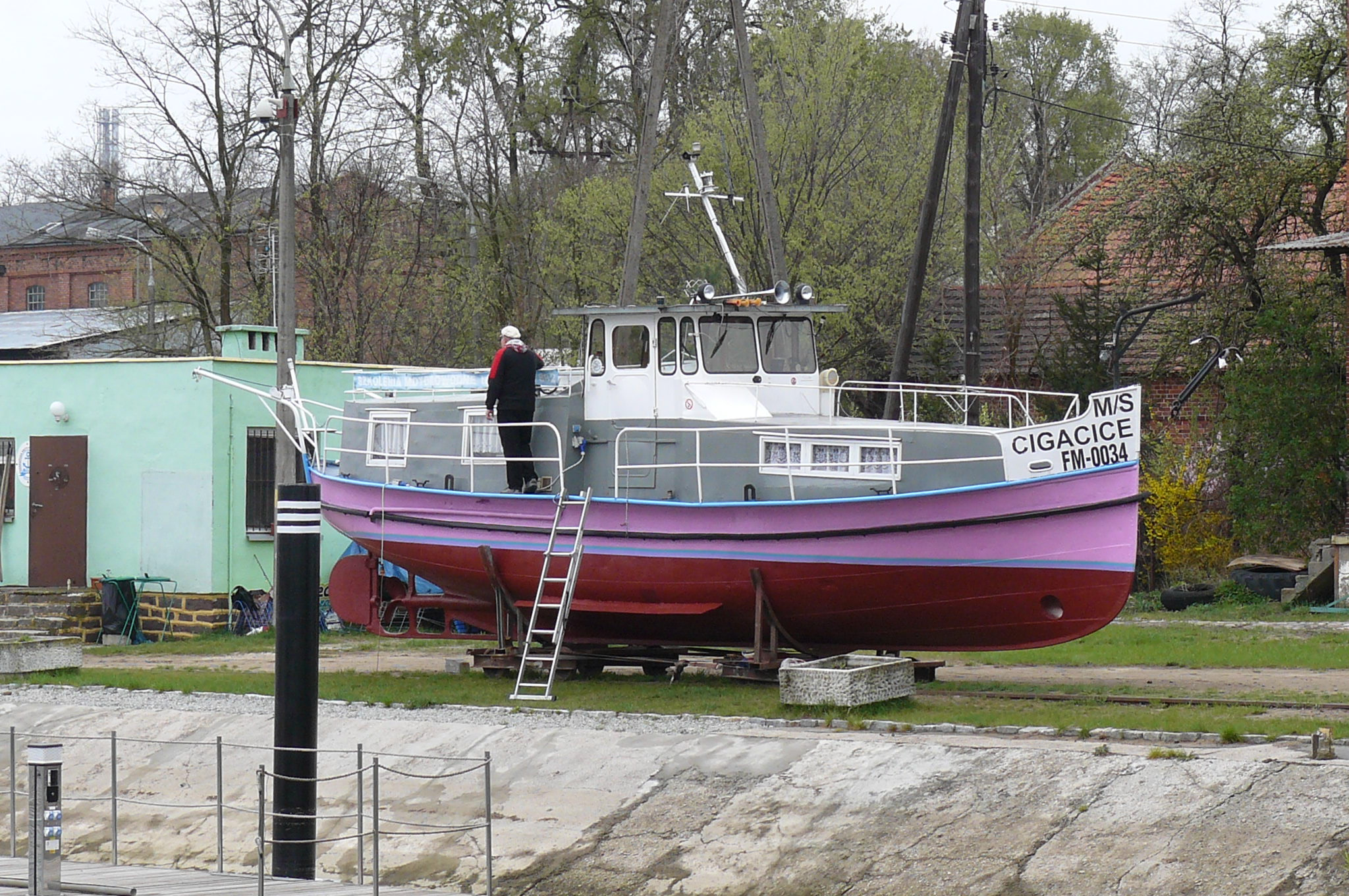 Cigacice - port na Odrze.